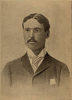 Убийца Карлайл Харрис.